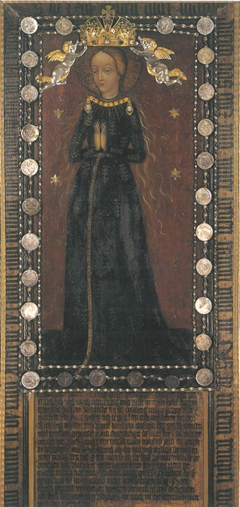 Podle pověsti zázračný obraz Panny Marie Budějovické z první poloviny 15. století s dodatečnými votivními dary